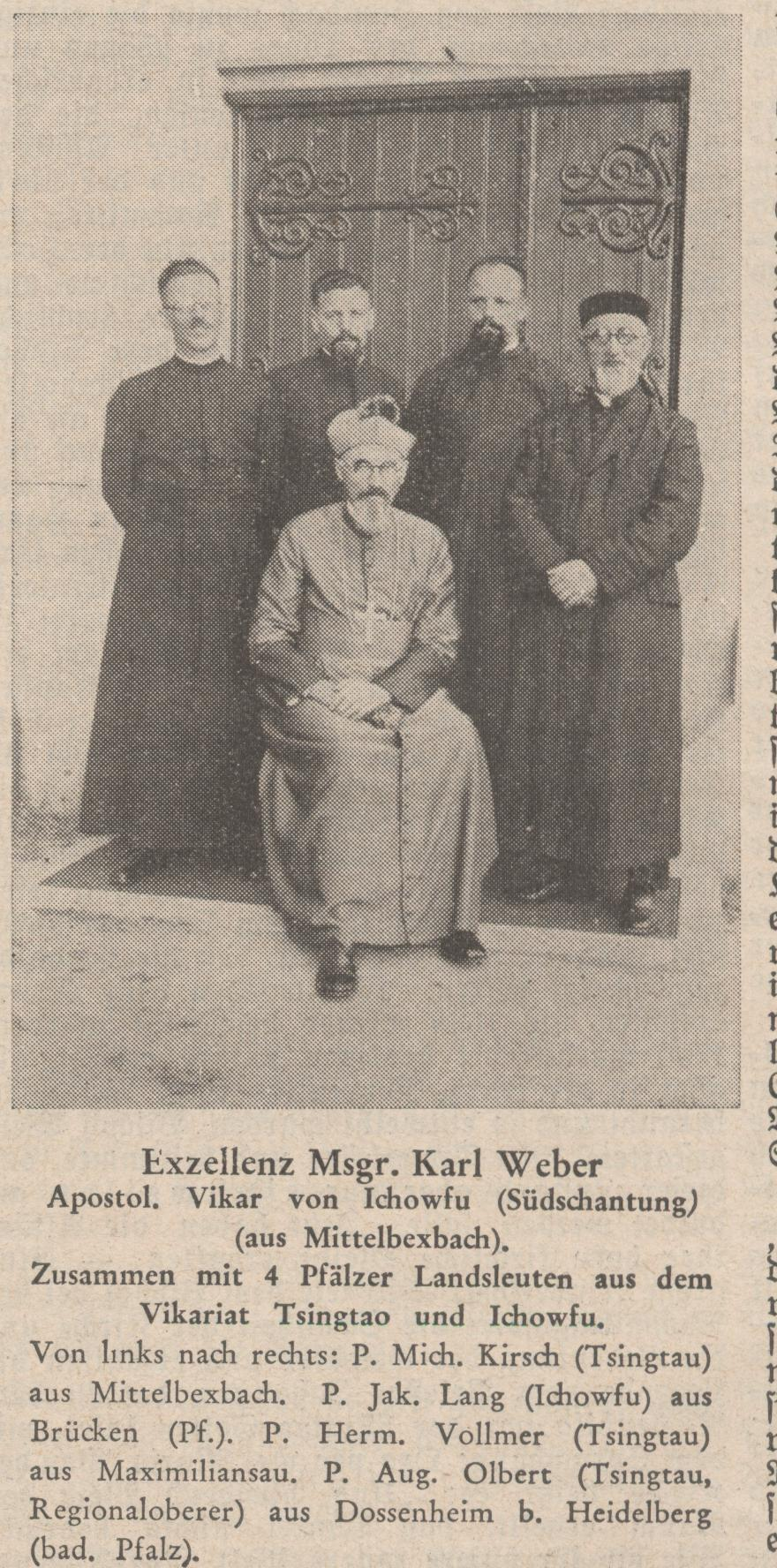 Bischof Karl Christian Weber am Tag seiner Bischofsweihe